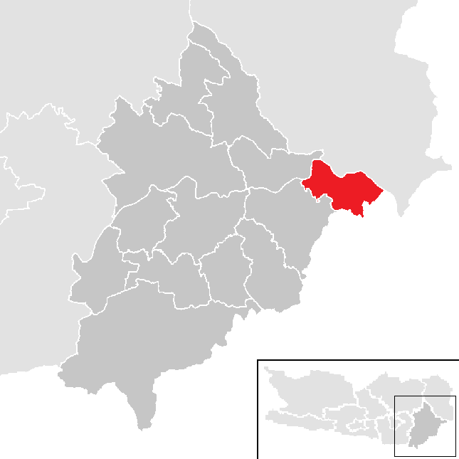 Bezirk Völkermarkt